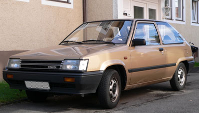 Das Bild zeigt meinen eigenen Wagen